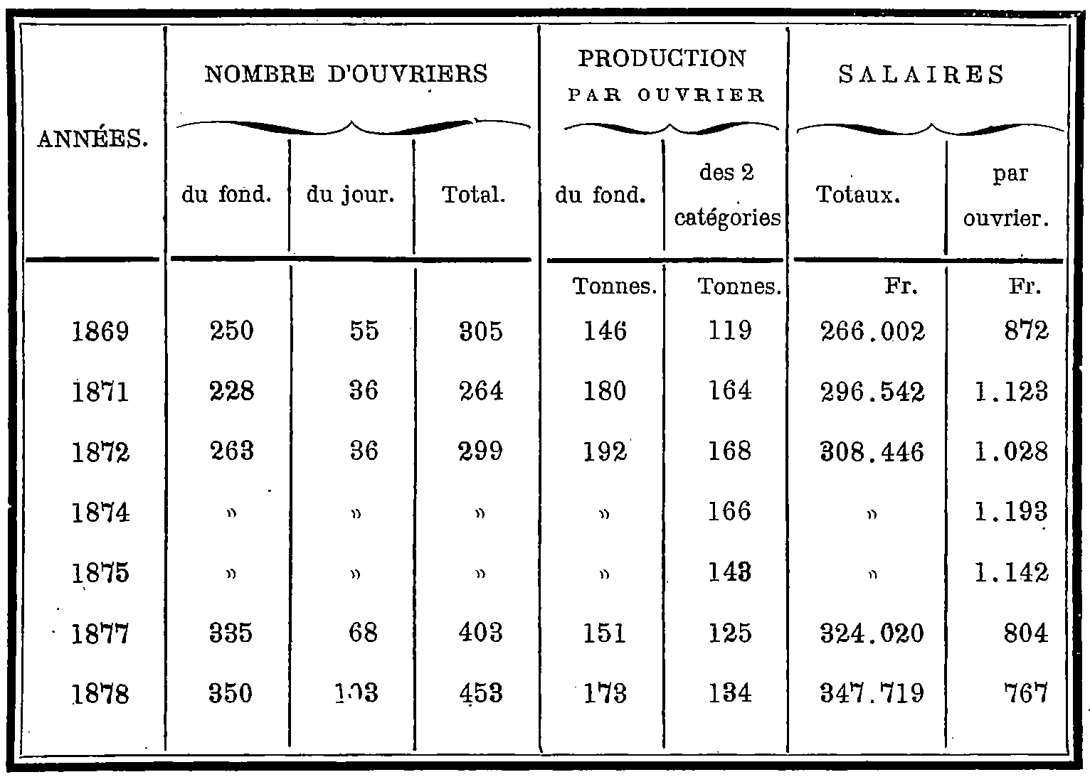 Ouvriers, rendement et salaires de 1869 à 1878 de la Compagnie des mines de Vendin.